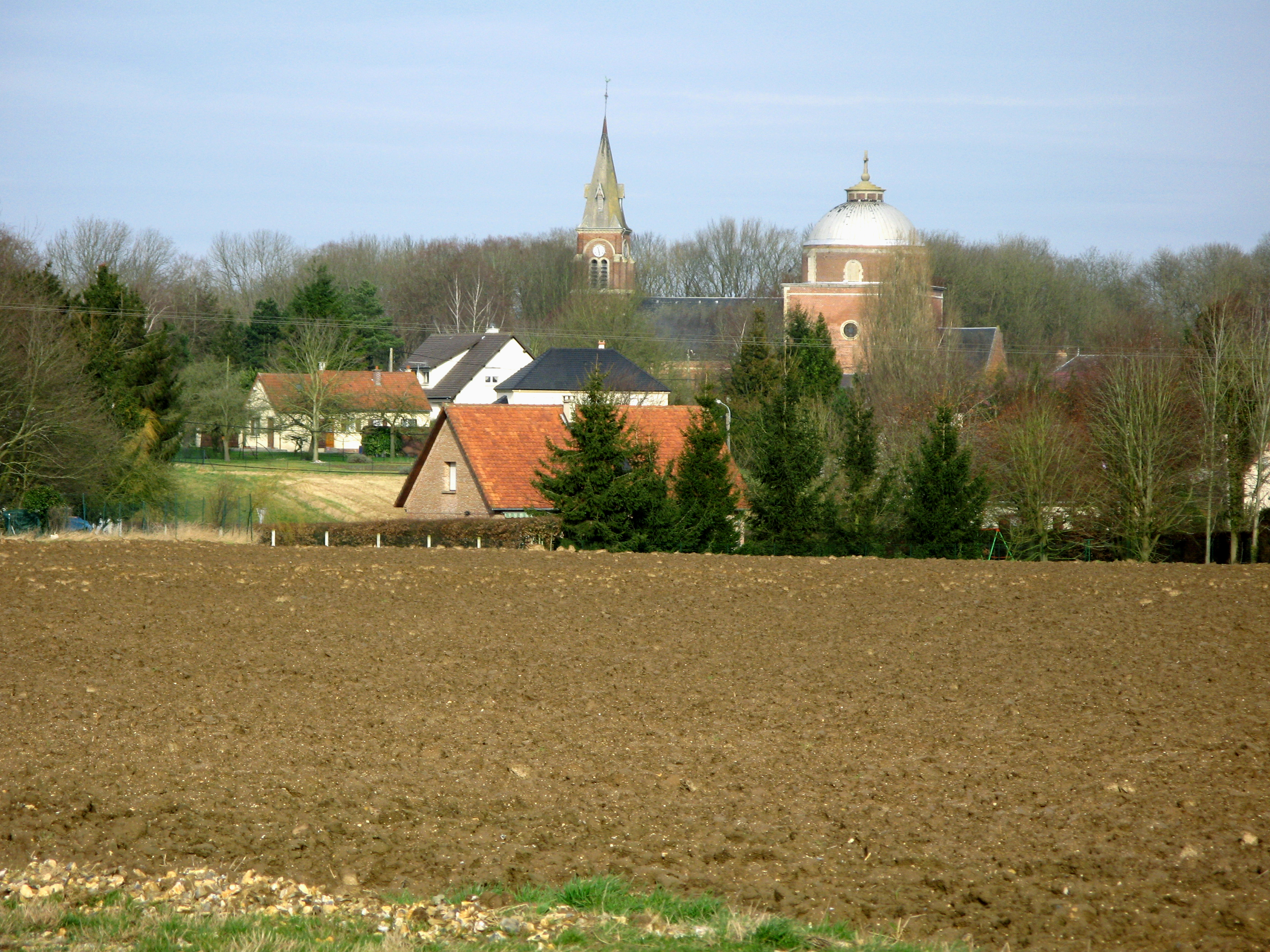 Grivesnes (Somme, France) - Panorama sur le village et son église (vue prise non loin du cimetière "Saint-Aignan", sur la route menant à Montdidier. .